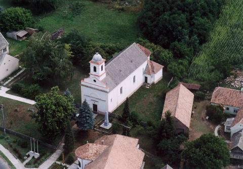 Görgeteg, Hungary, aerialphotography. Nagyboldogasszony római katolikus templom